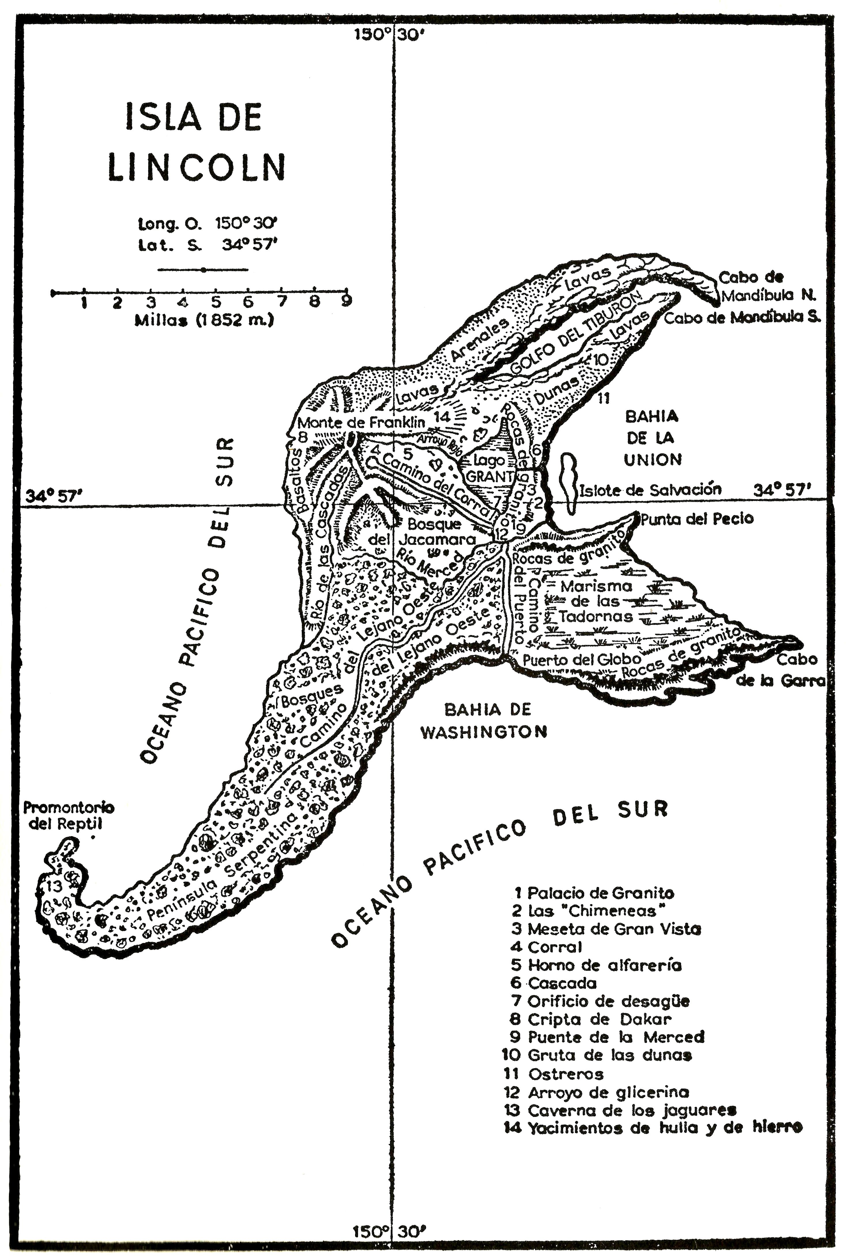 Ilustración de la Isla de Lincoln en español